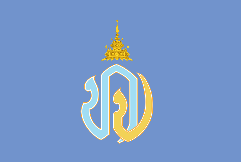 ธงประจำพระองค์ สมเด็จพระเจ้าลูกยาเธอ เจ้าฟ้าทีปังกรรัศมีโชติ มหาวชิโรตตมางกูร สิริวิบูลยราชกุมาร